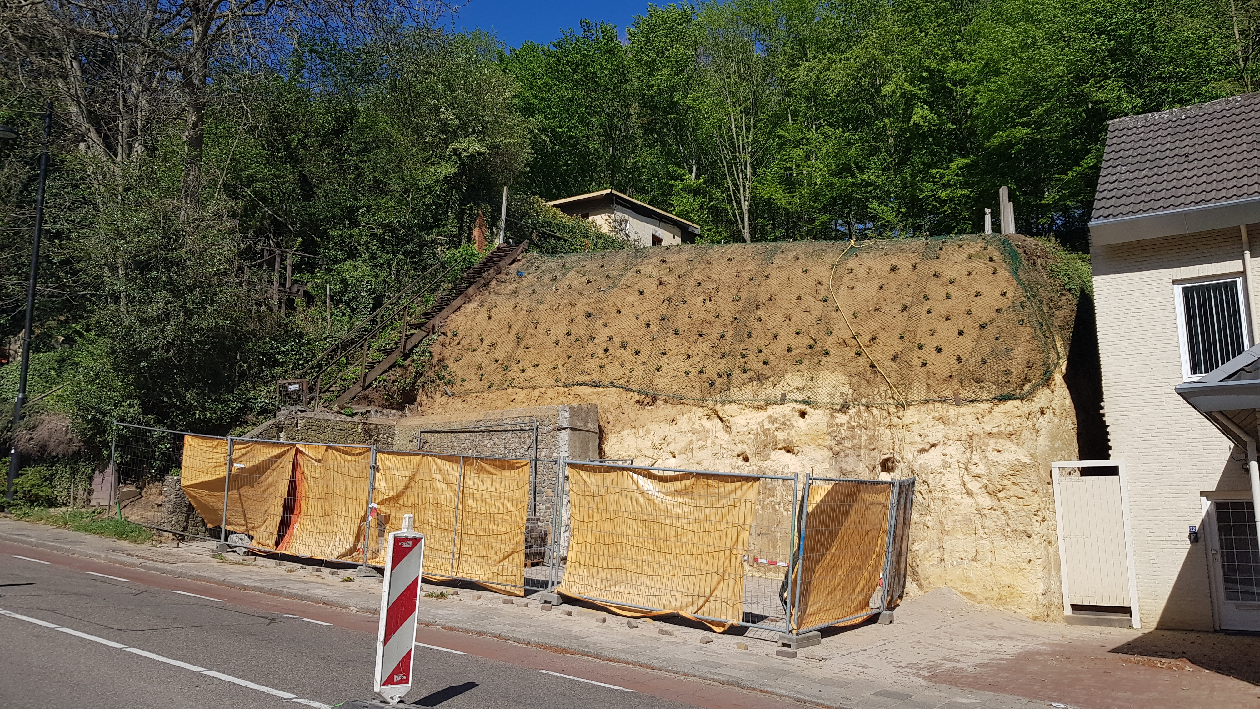 de locatie van de Grotwoning Tante Ceel anno 2020, Cauberg, Valkenburg aan de Geul, Nederland